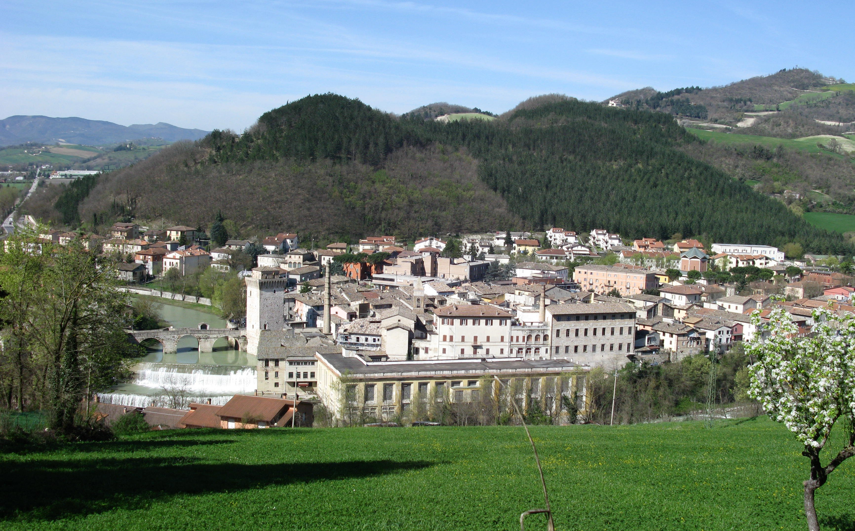 Panorama di Fermignano.